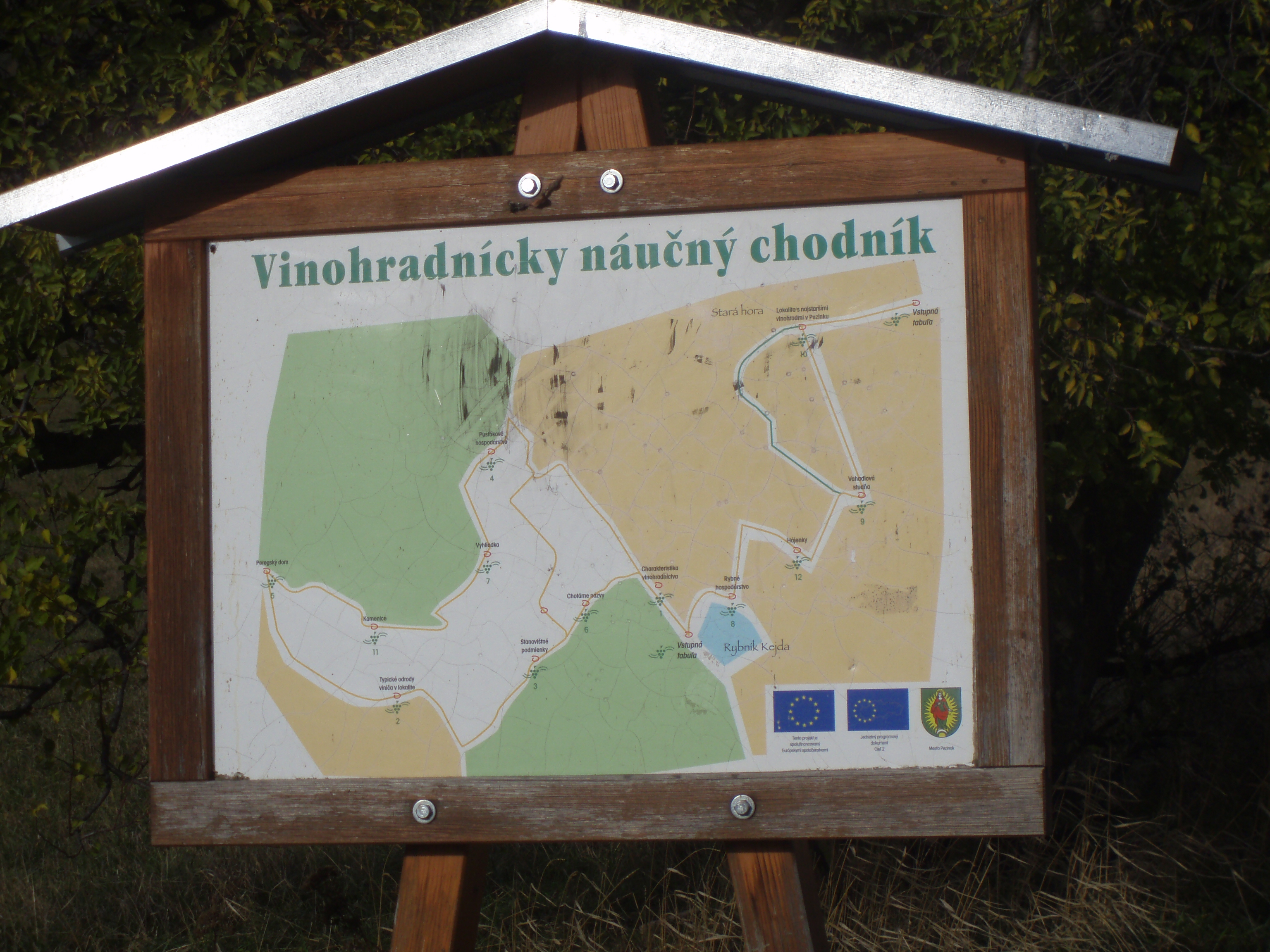 Vinohradnícky náučný chodník